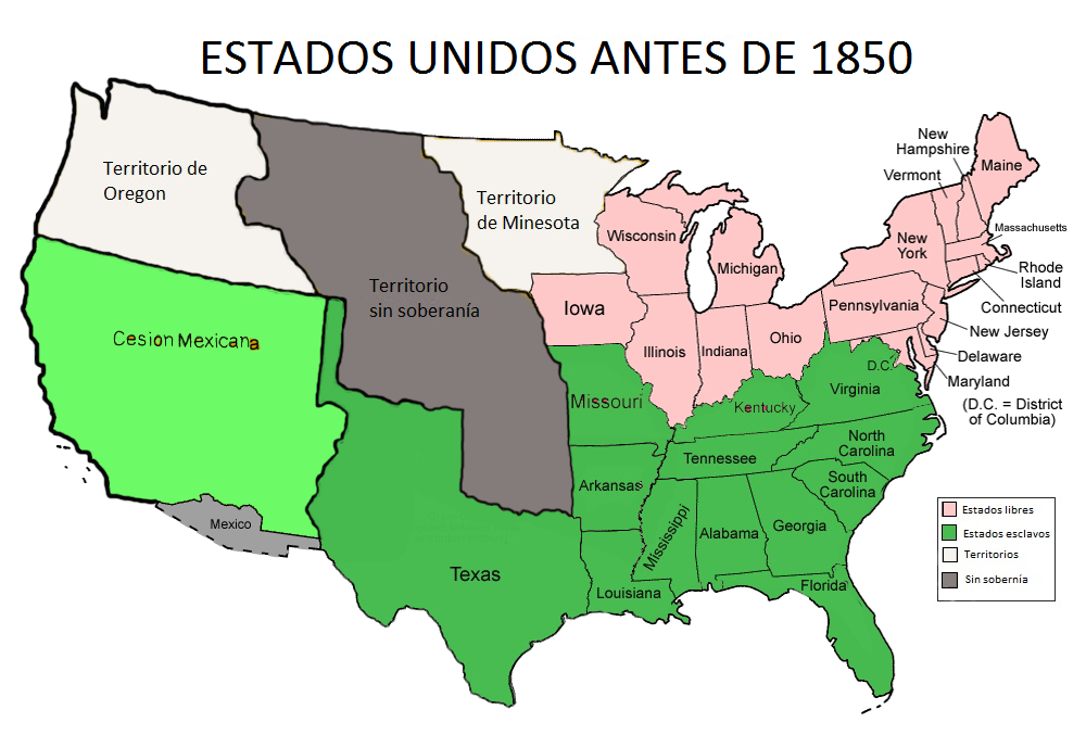 Mapa de los Estados Unidos luego de ganar la Guerra contra México y antes de que se estableciera el Compromiso de 1850